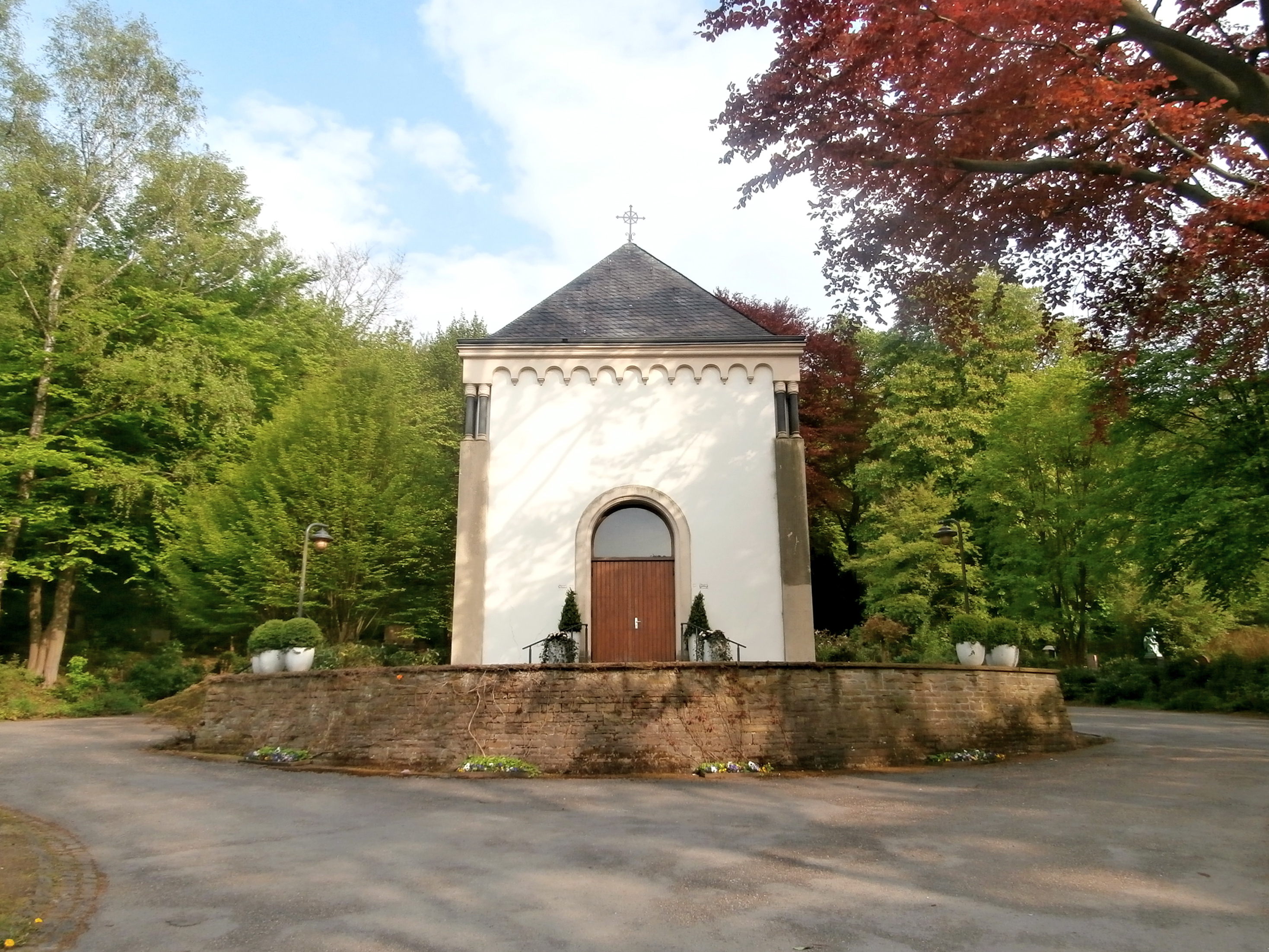 Untere Kapelle des Gerresheimer Waldfriedhofs.